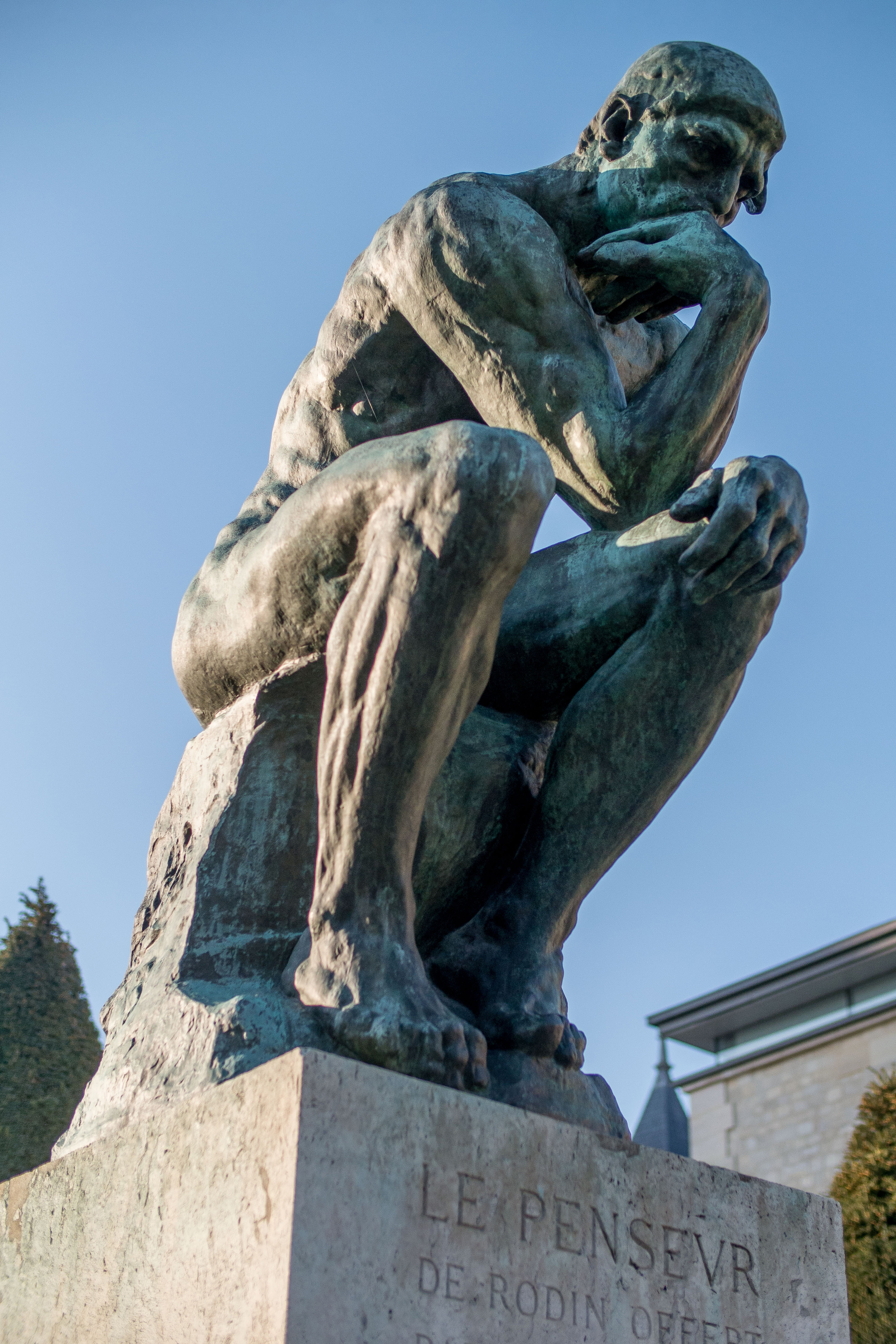 Auguste Rodin, "Le Penseur", 1881-1882, Sculpture (bronze), Musée Rodin, Paris, France